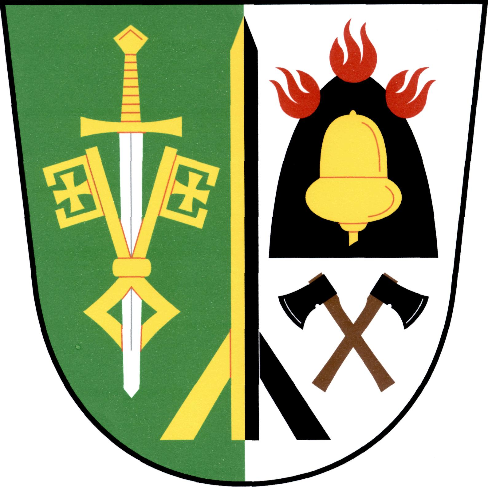 Znak obce Milíře (okres Tachov)